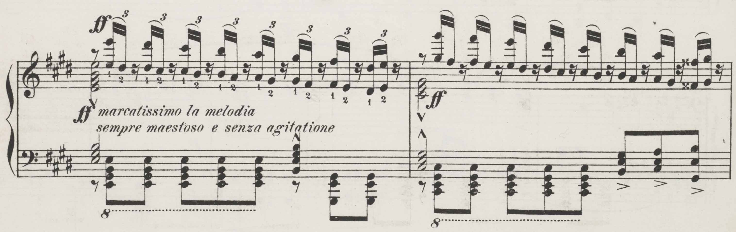 Ausschnitt aus der Tannhäuser-Ouvertüre mit Seufzerketten